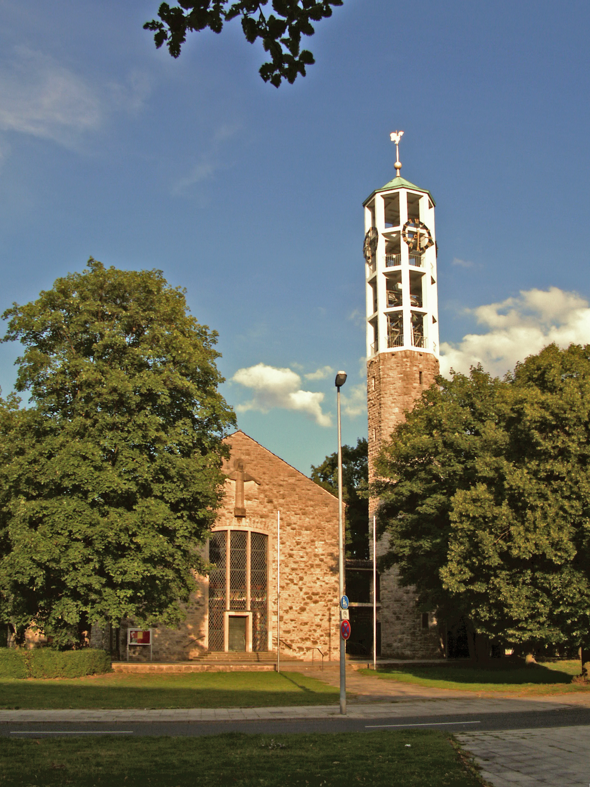 Evangelisch-lutherische Christuskirche in Wolfsburg